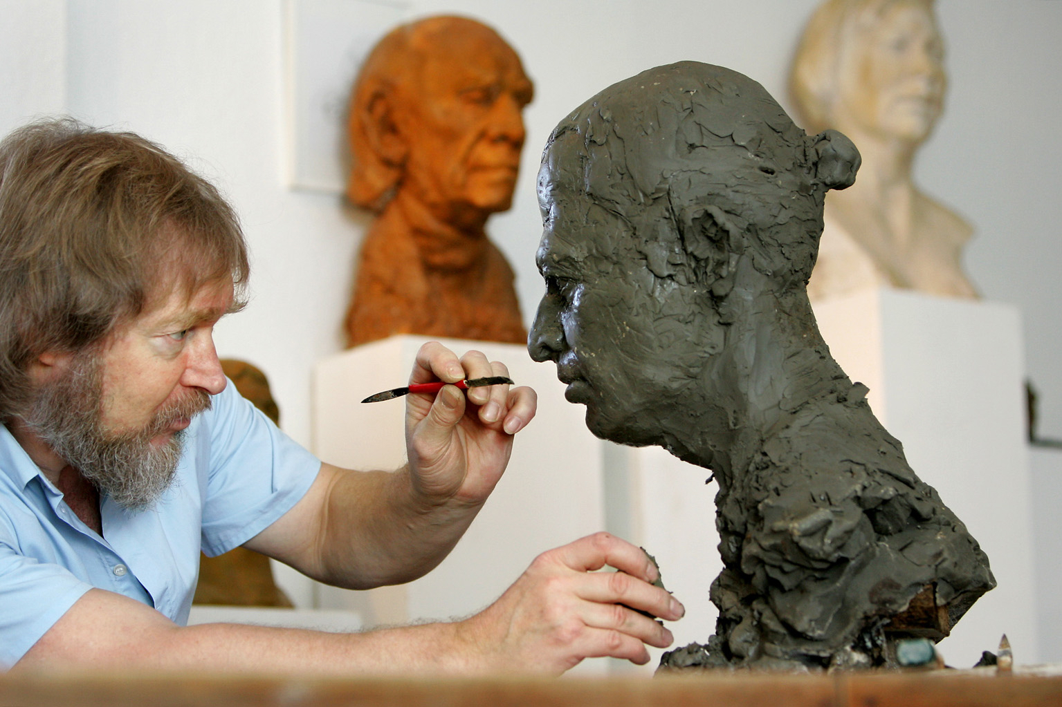 06.01.2005 "Gautam", Bildhauer / Künstler eröffnet Porträtschule. Foto: Andreas Krebs